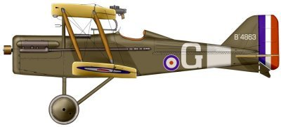 James McCudden's SE5a.